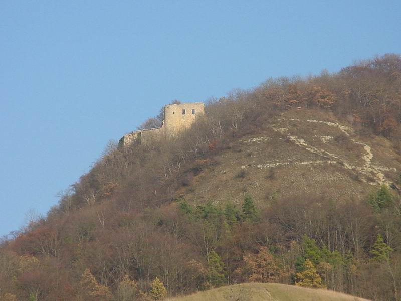 Gleißburg, public domain, eigenes Foto Mewes 08:01, 13. Feb 2005 (CET)